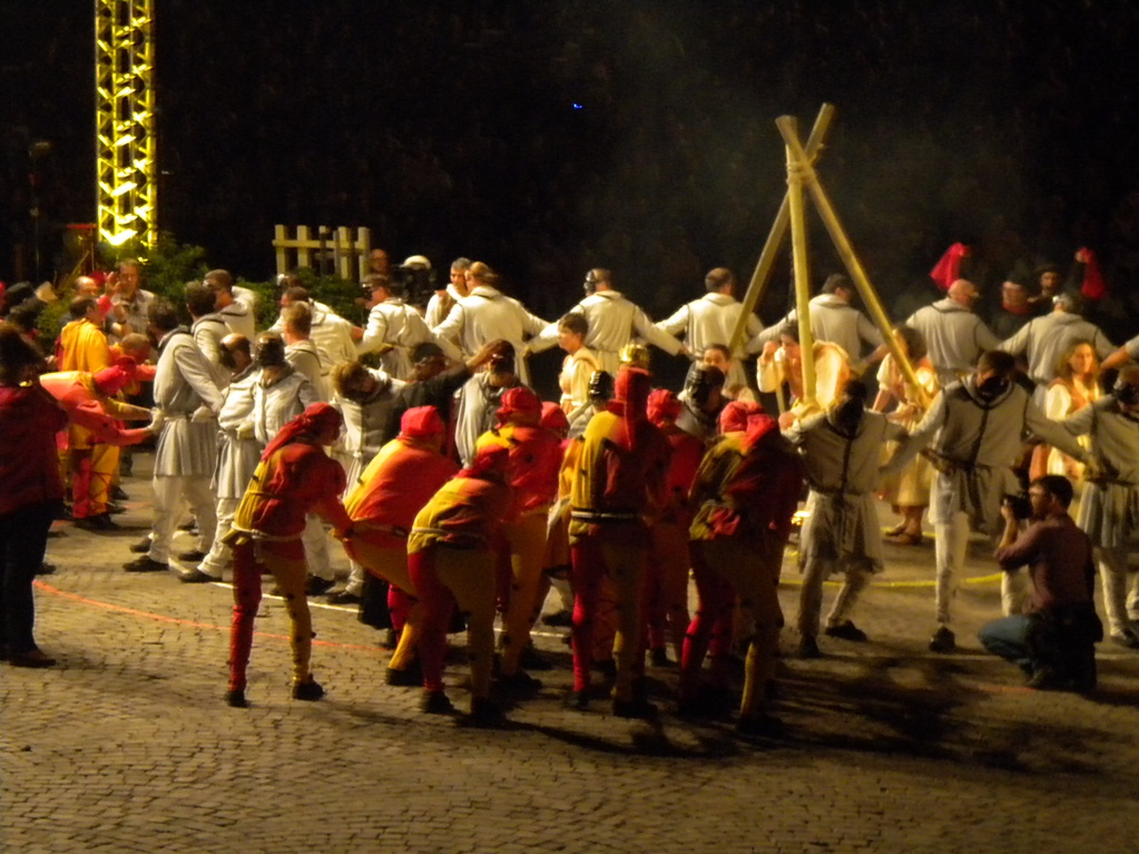 Mascherata dei Ciusi e Gobj: I Ciusi attaccano i Gobj. Feste Vigiliane 2009, Trento